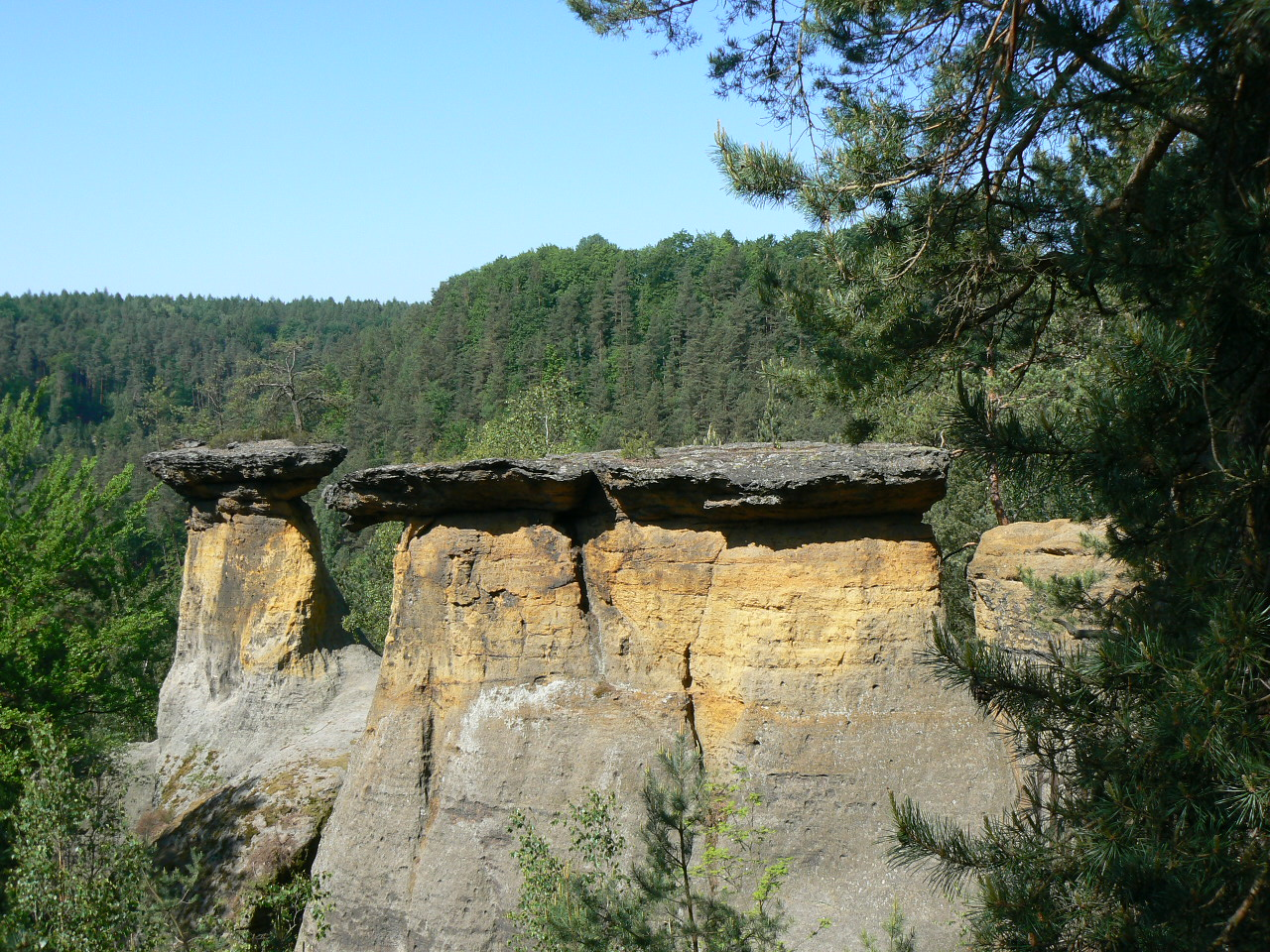 Mšenské pokličky - geologický útvar vzniklý zvětráváním vrstev pod odolnějšími železitými pískovci